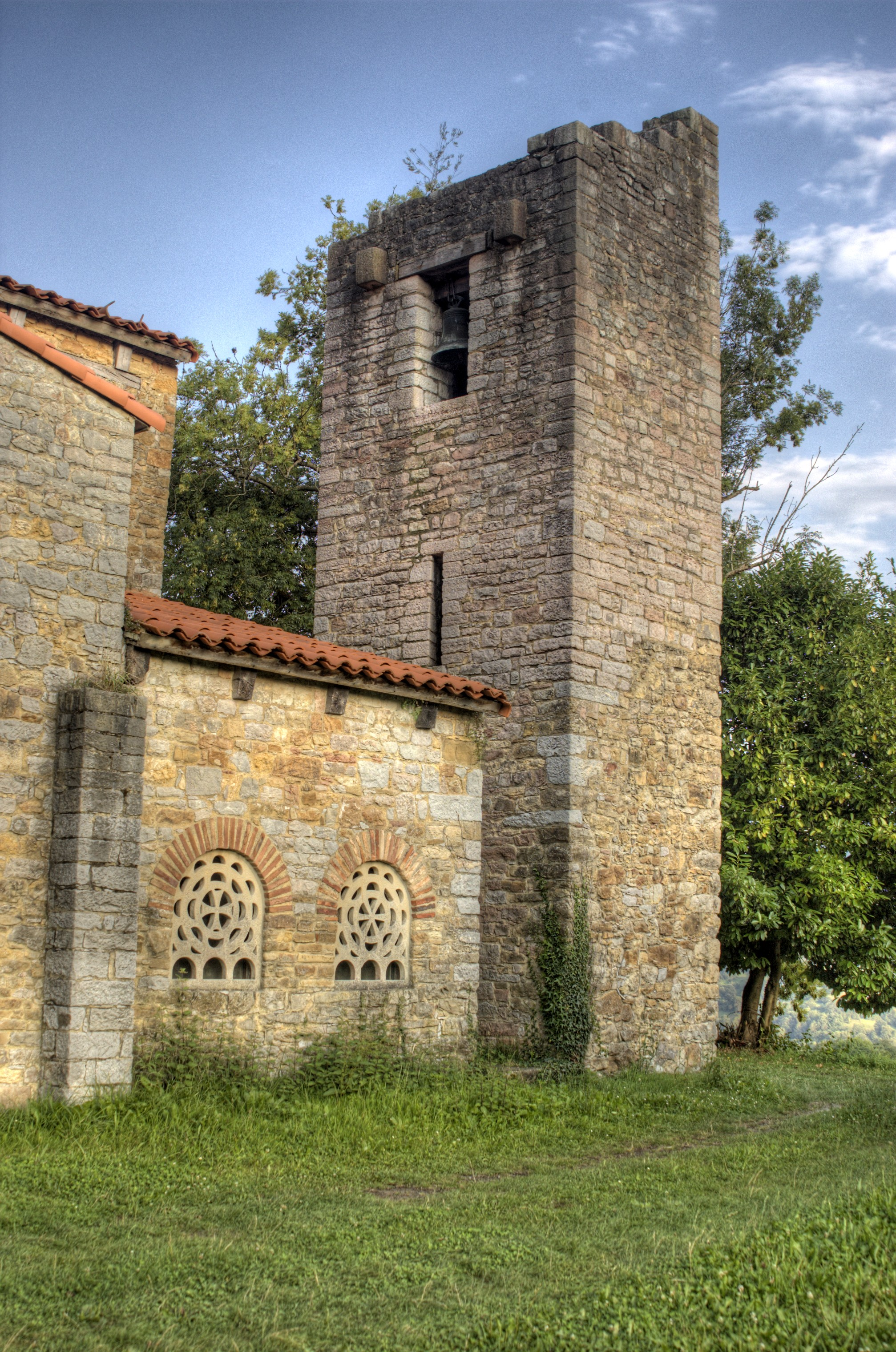 Iglesia del siglo IX, sin datos sobre la fecha exacta de su construcción.